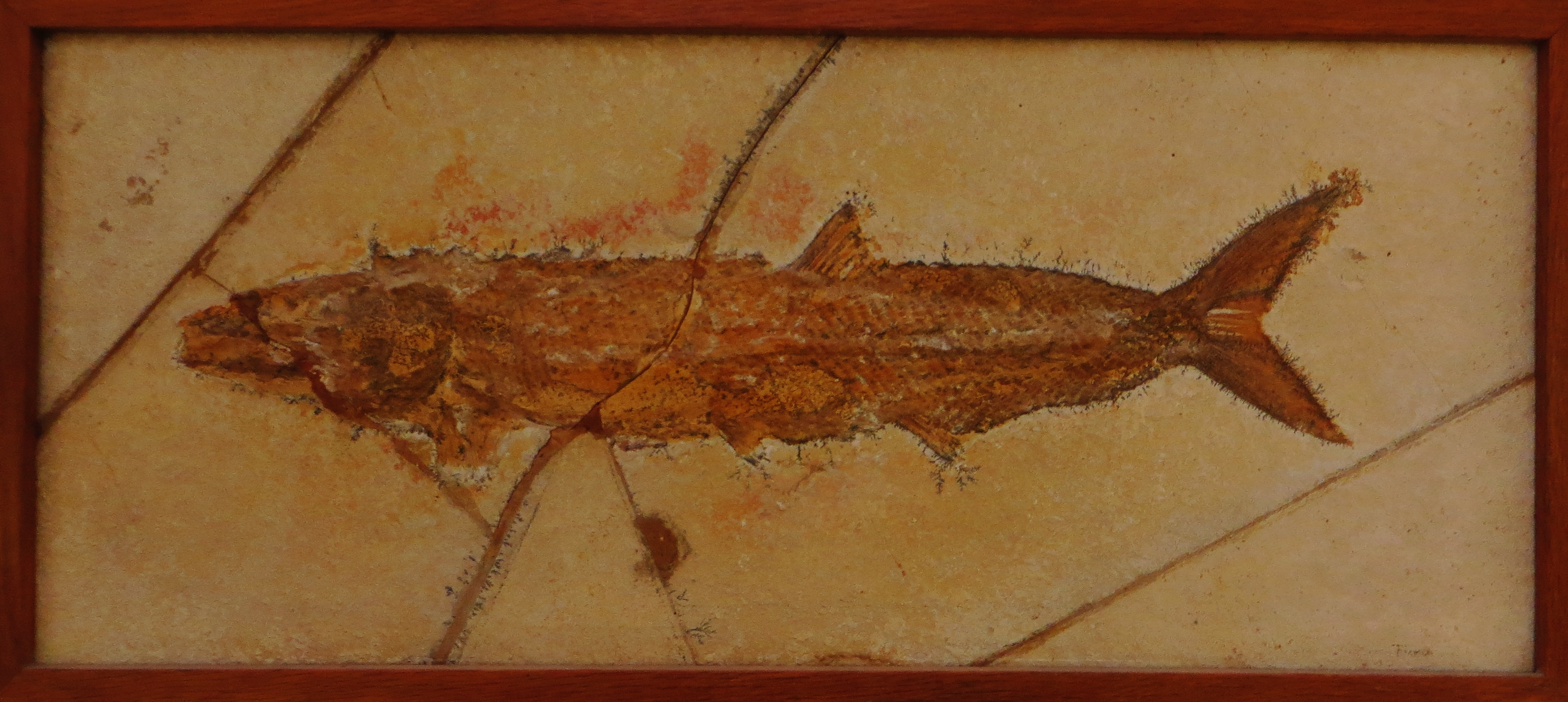 Took the picture at Museum Berger, Eichstaett